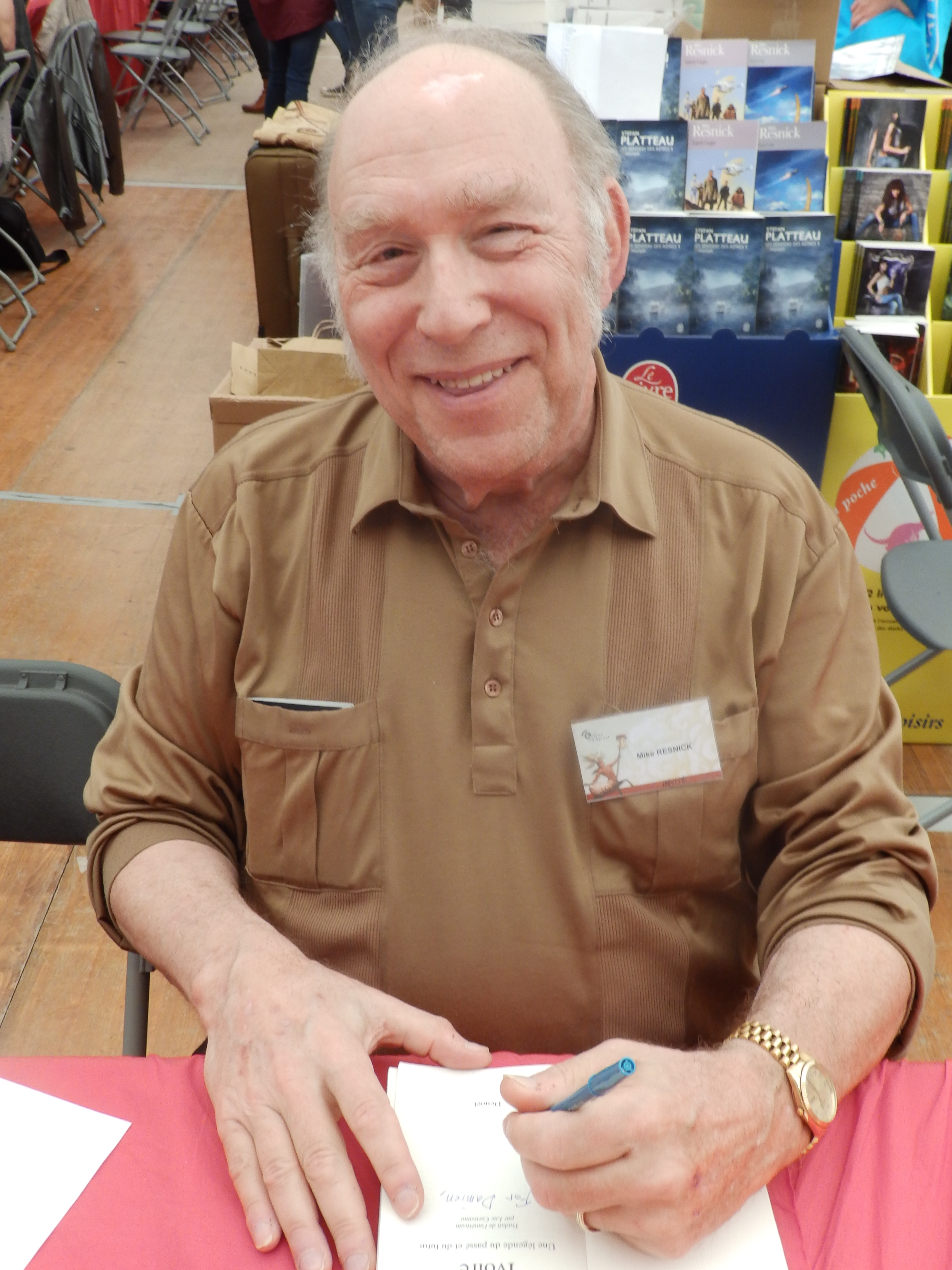 L'écrivain de science-fiction américain Mike Resnick en dédicace lors de la 15ème édition du festival des mondes imaginaires Les Imaginales, à Épinal (département des Vosges, en France) en mai 2016.